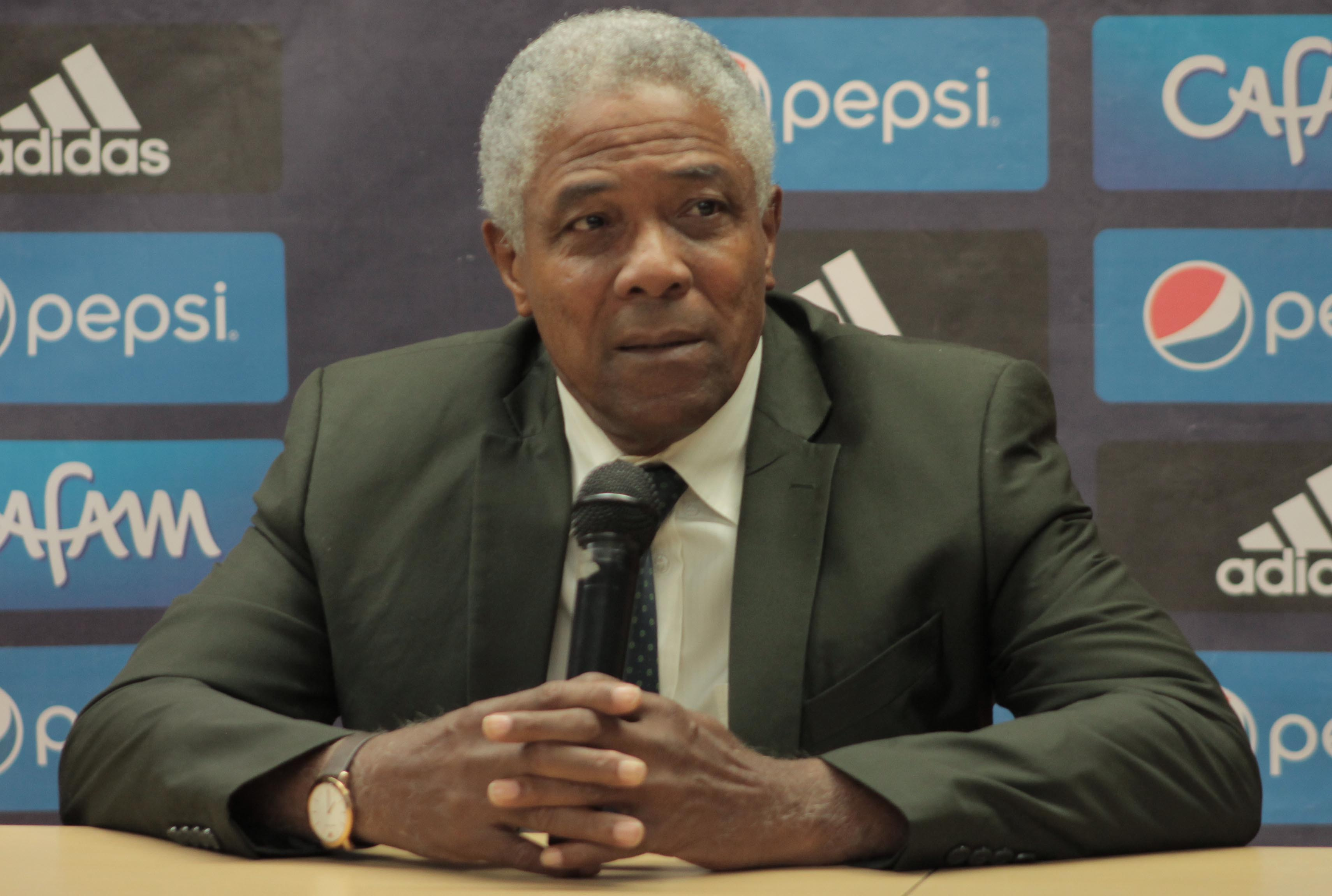 El técnico colombiano de fútbol, Francisco Maturana.